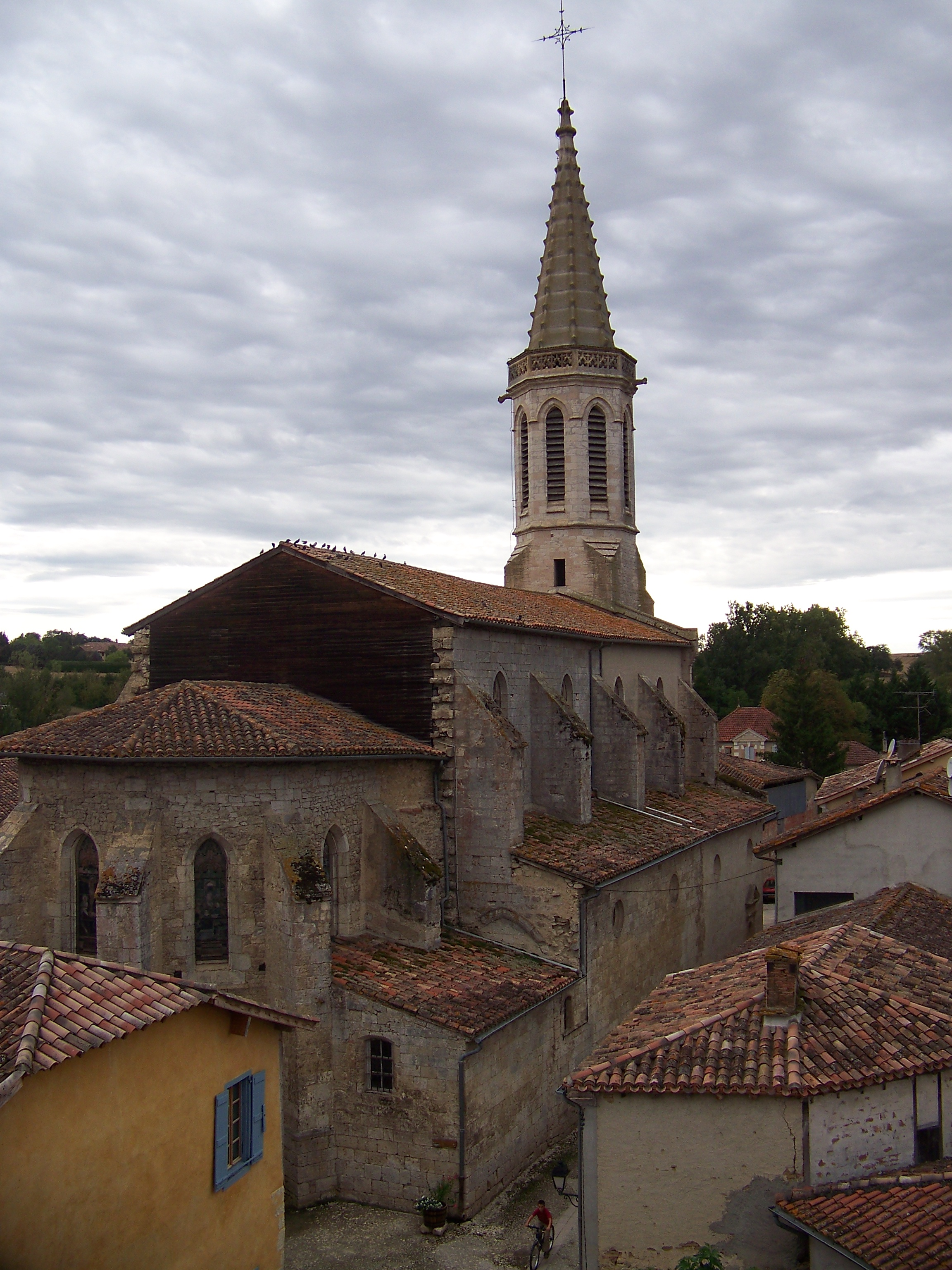 Sarrant (Gers, France). L'église Saint-Vincent et les toits du village.